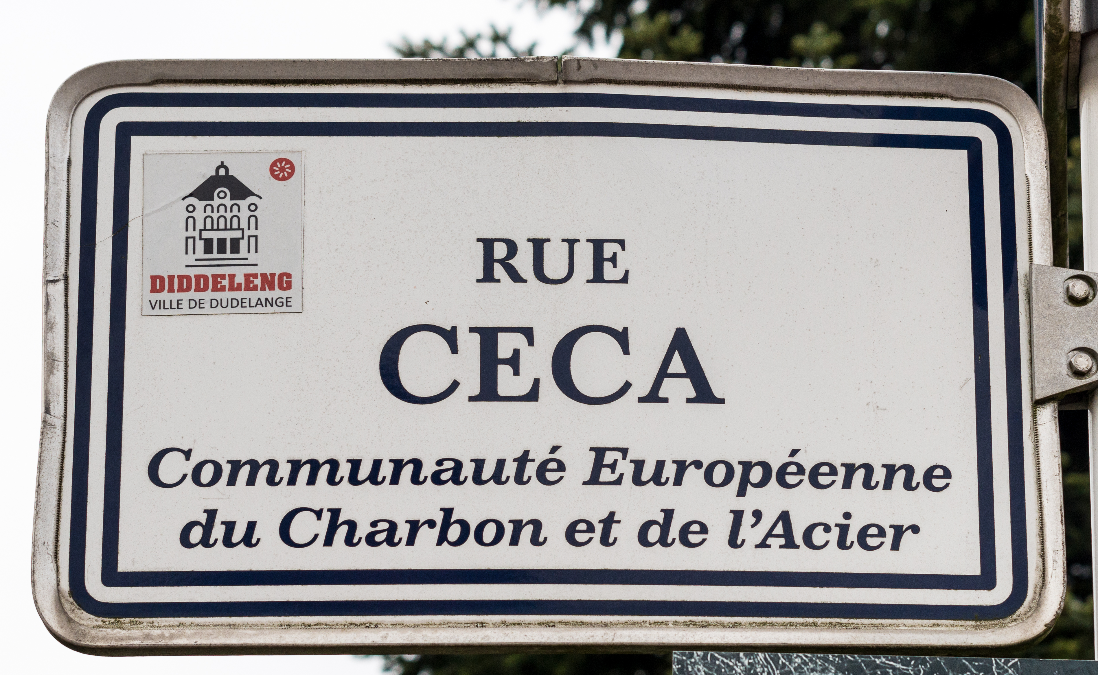 Stroosseschëld zu Diddeleng.